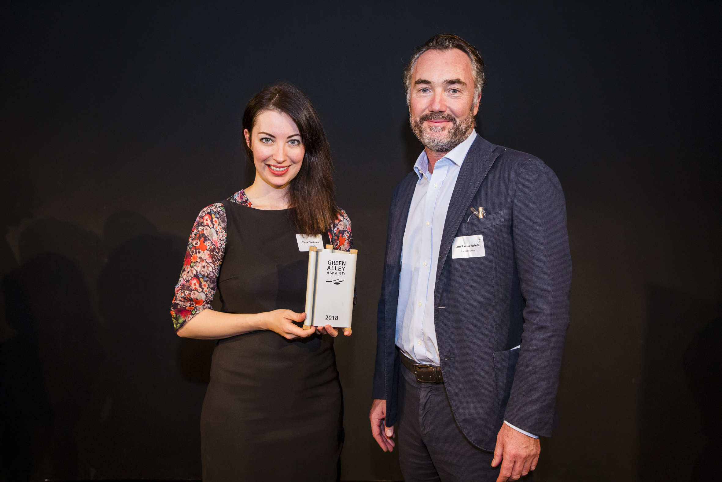 Green Alley Award 2018